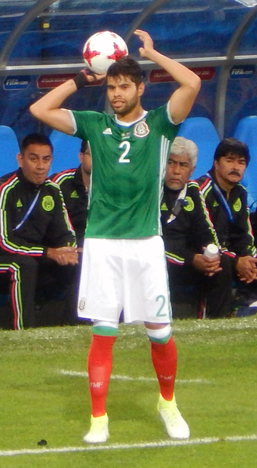 Нестор Араухо в матче против сборной Новой Зеландии